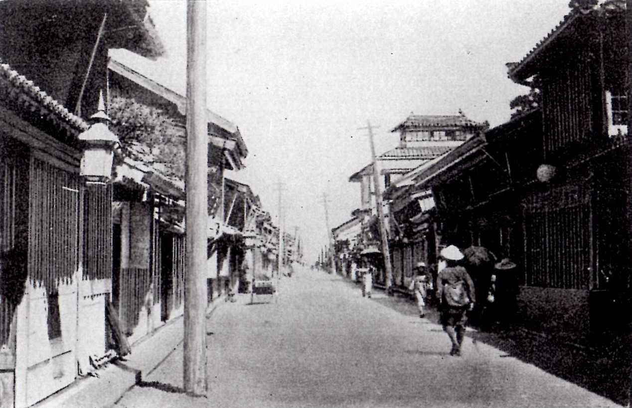 明治末期の上伝馬通。愛知県豊橋市。